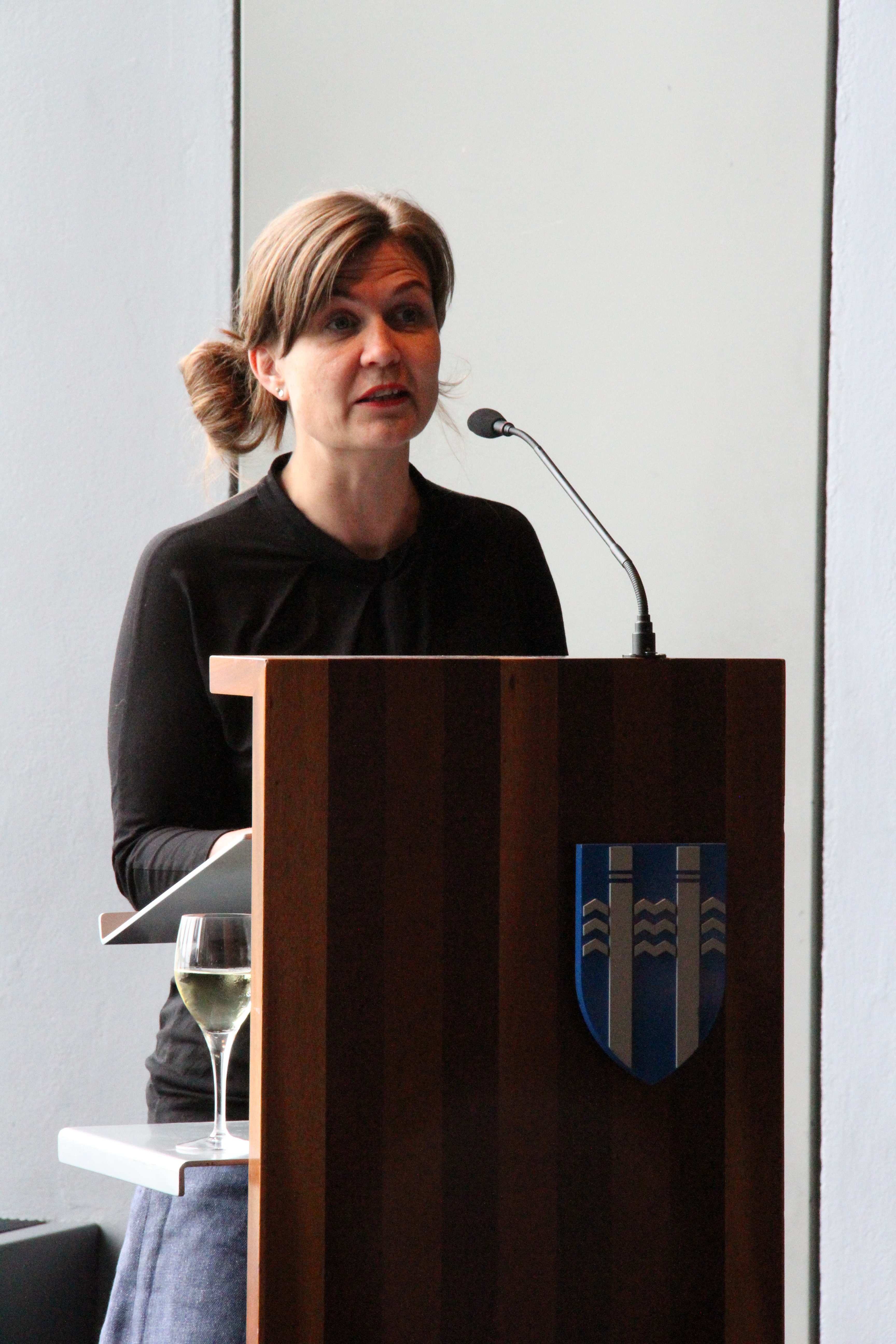 Sóley Tómasdóttir im Rathaus von ReykjavíkÍslenska: Sóley Tómasdóttir